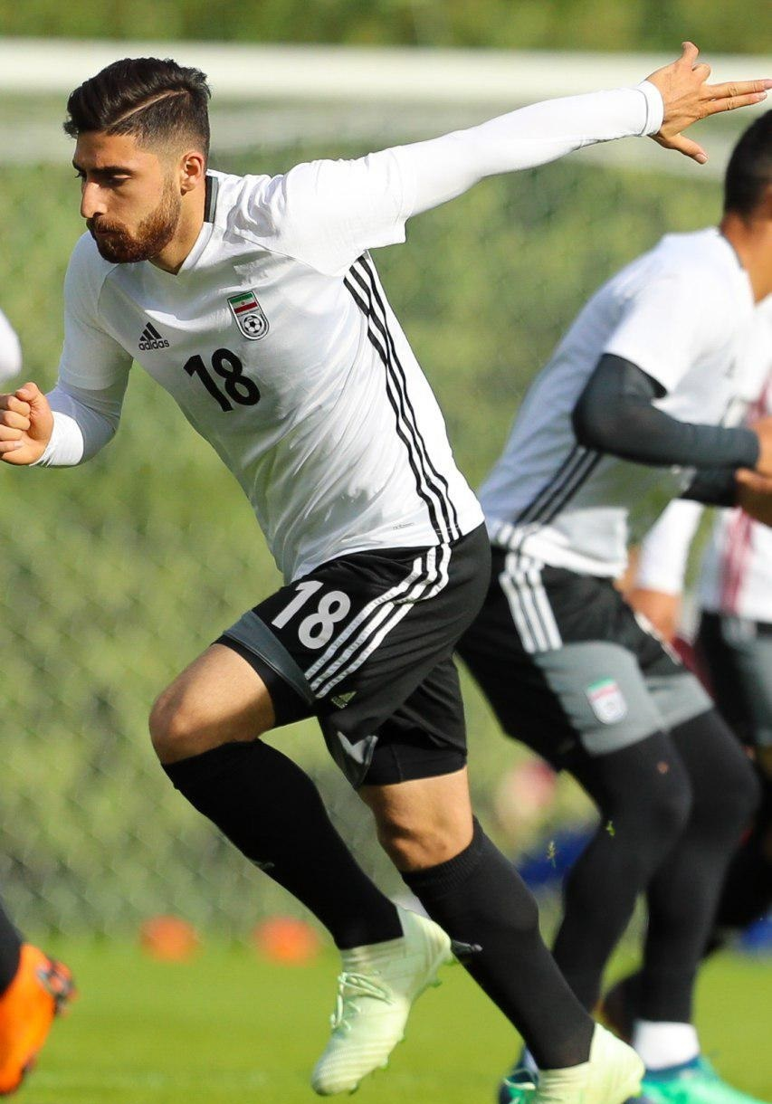 علیرضا جهان‌بخش در تمرین تیم فوتبال ایران